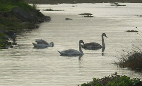 Βουβόκυκνοι στην Λιμνοθάλασσα Αταλάντης